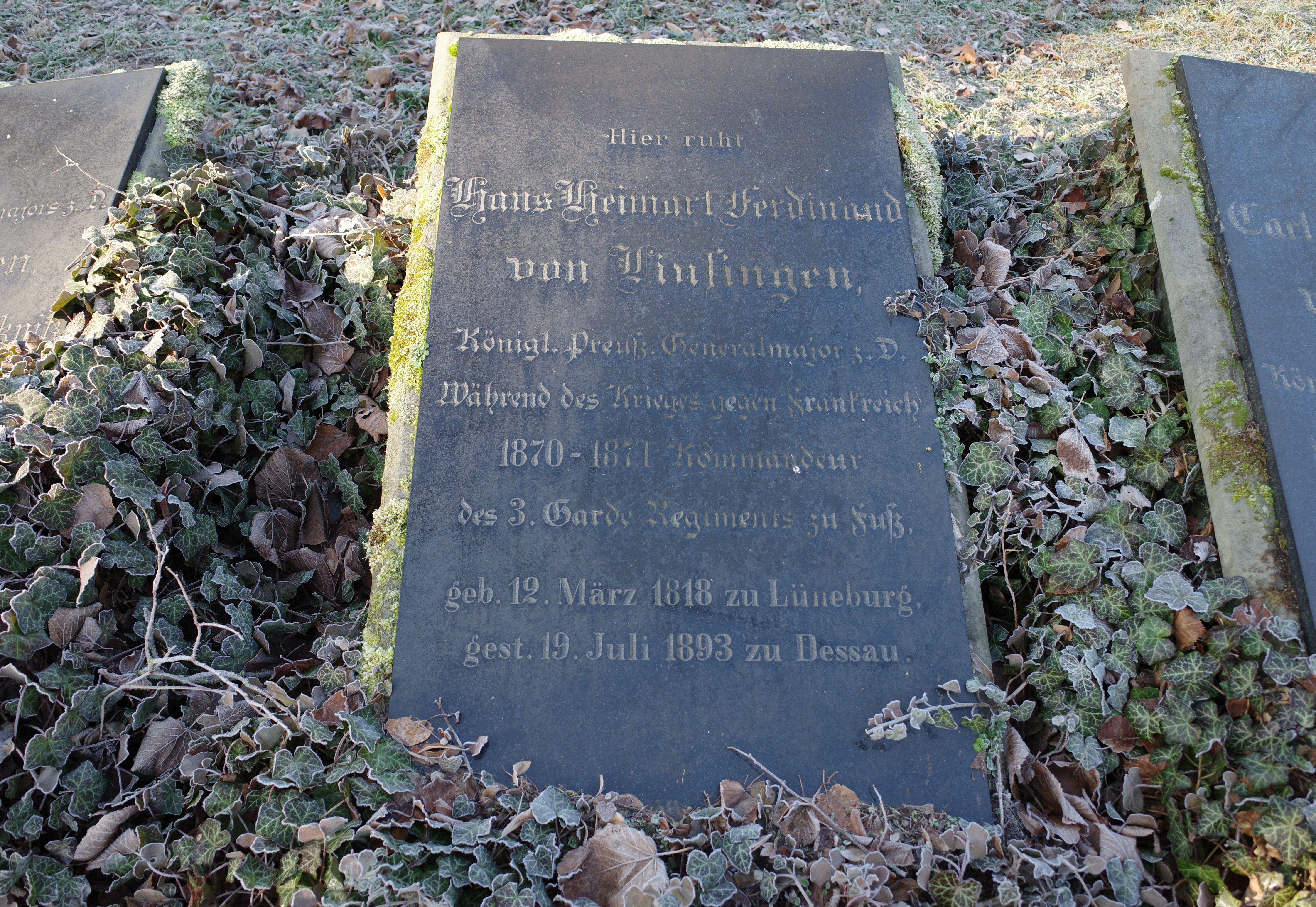 Dessau-Roßlau, Ruhestätte von Hans Heimart Ferdinand von Linsingen auf dem Friedhof 3.